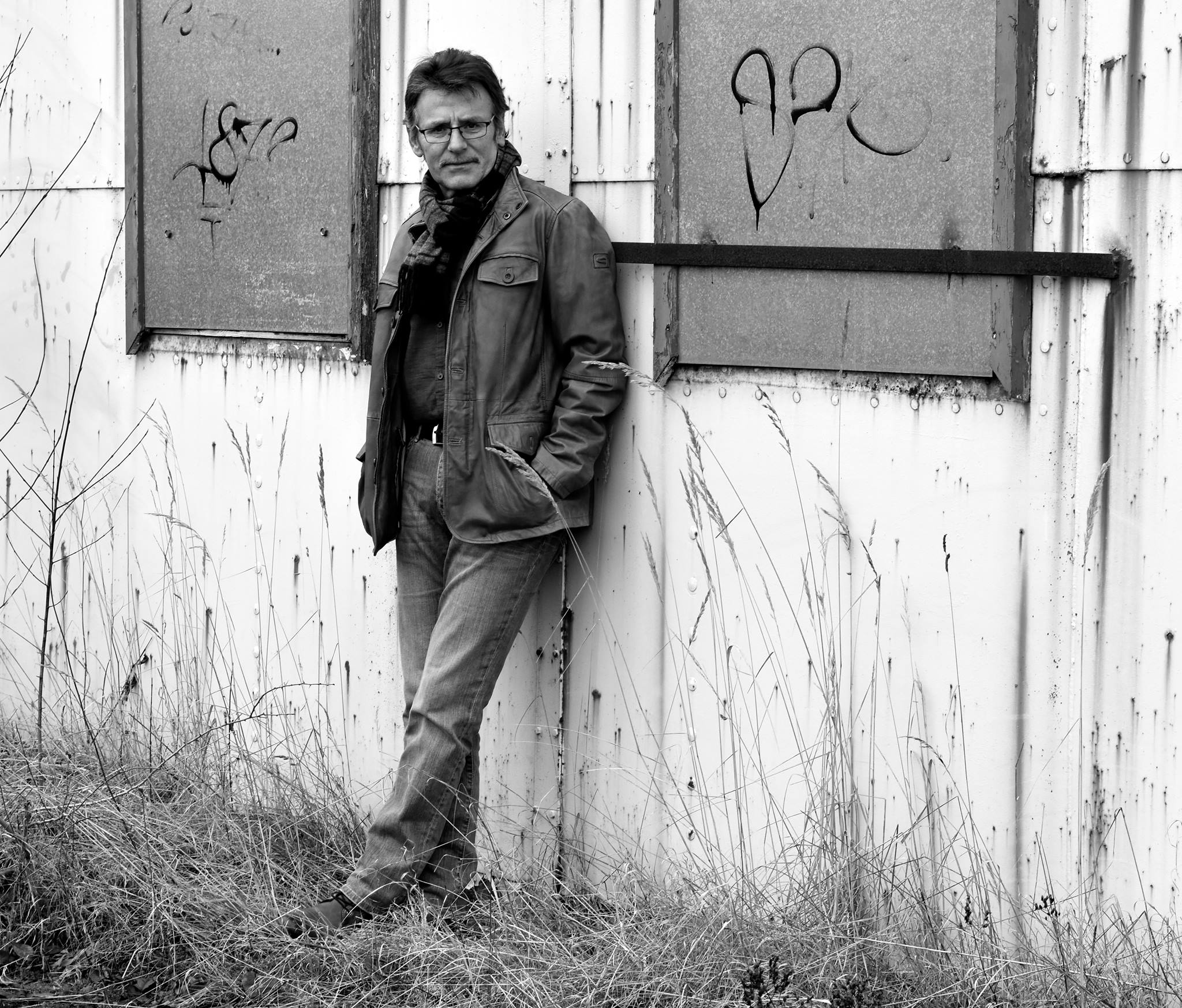 An den Northeimer Kiesseen